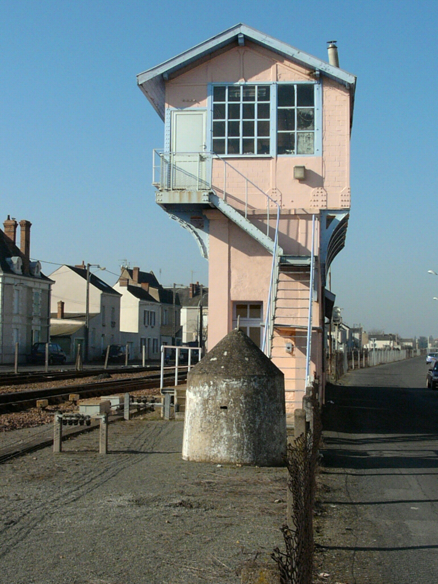 Poste d'aiguillage près de la gare des chemins de fer Thouars Deux-Sèvres France